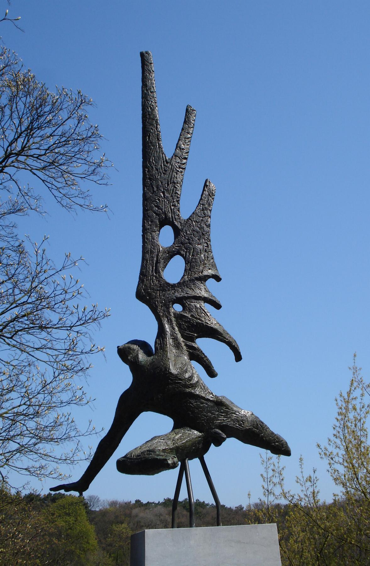 Den Haag, Hogeweg (Scheveningse Bosjes). Kunstwerk "De val van Icarus" / Monument Englandspiel van Titus Leeser. The Hague/The Netherlands.